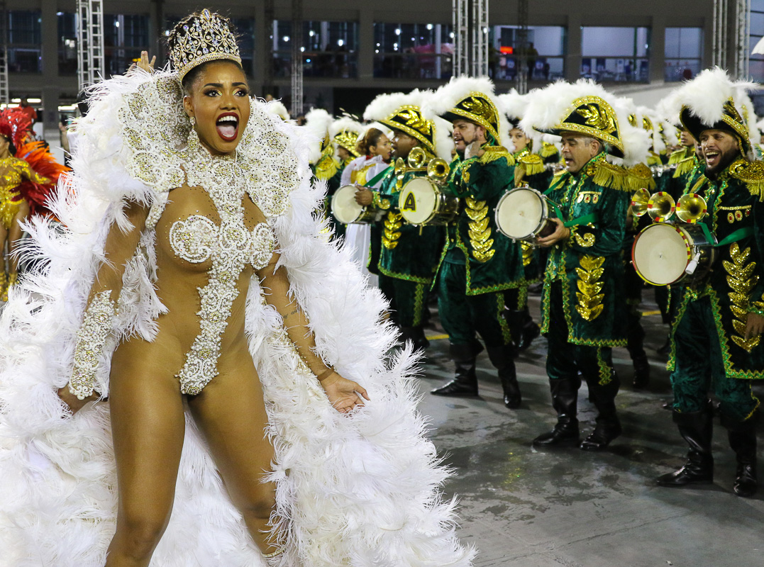 Desfile das Escolas de Samba de SP